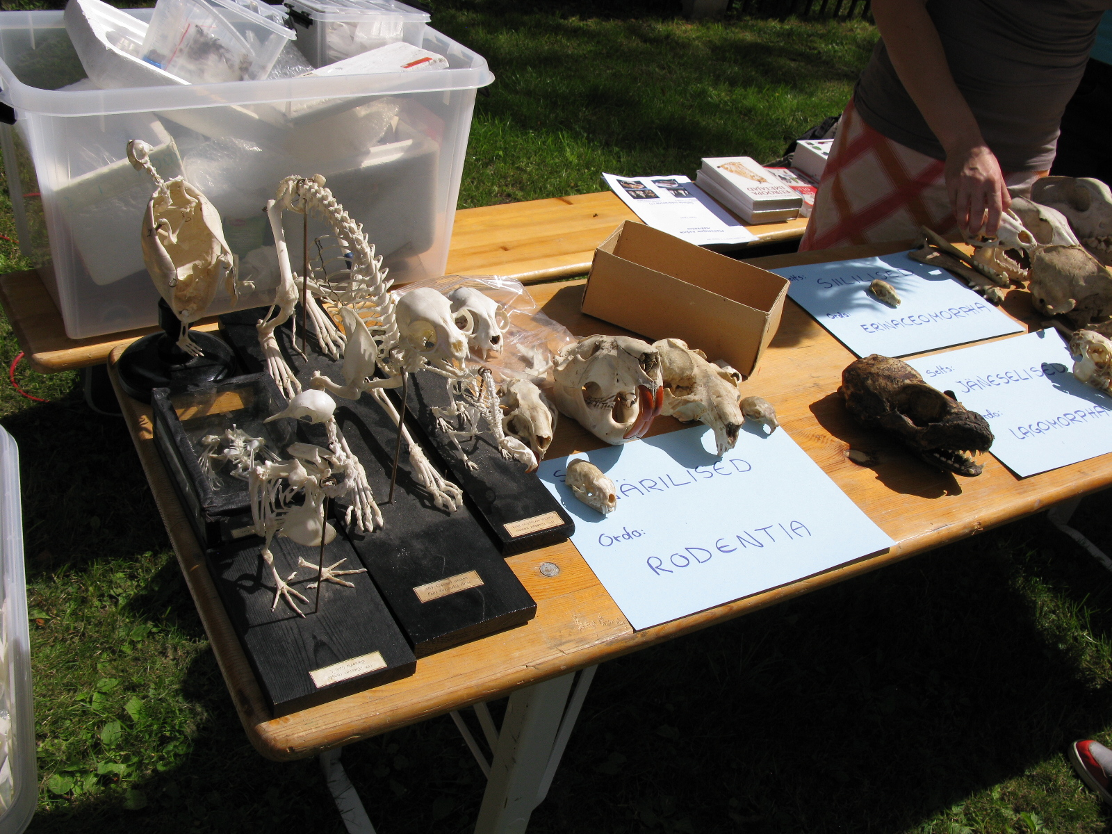 Loomakolbad Tartu tähetorni juures Toomemäel Tartu hansapäevadel, 20. juuli 2012. Foto: Oop.